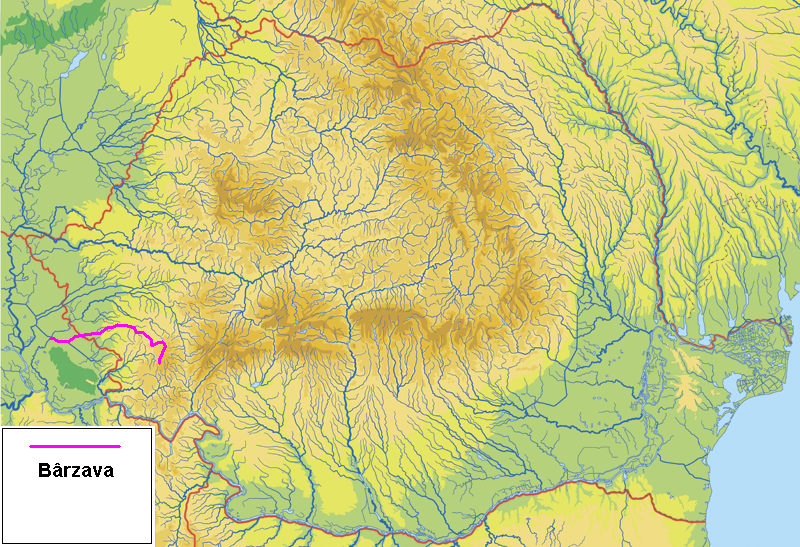 Barzava river